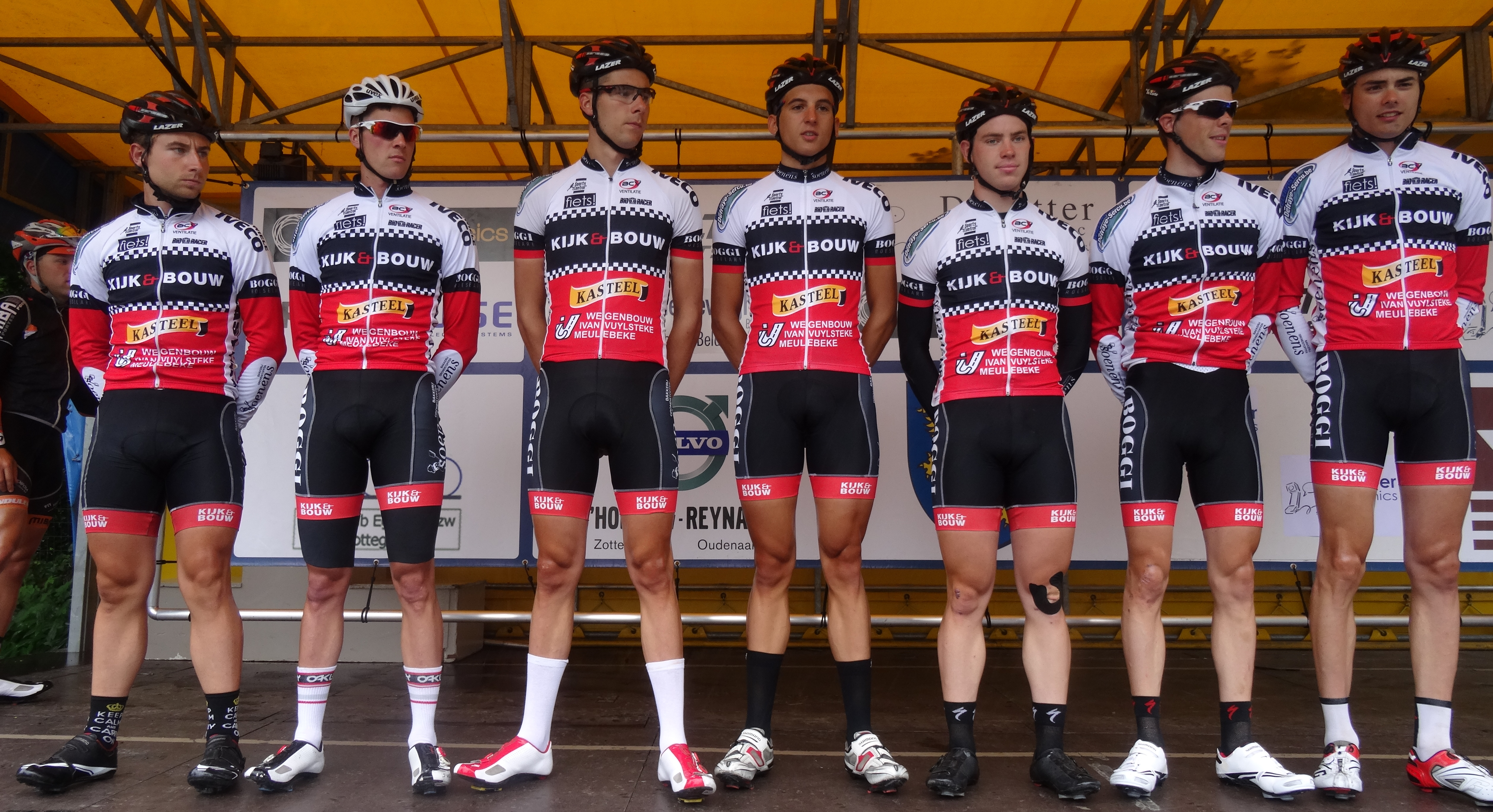 Reportage photographique réalisé le samedi 5 juillet à l'occasion du départ et de l'arrivée du Circuit Het Nieuwsblad espoirs 2014 à Grotenberge (Zottegem), Belgique.